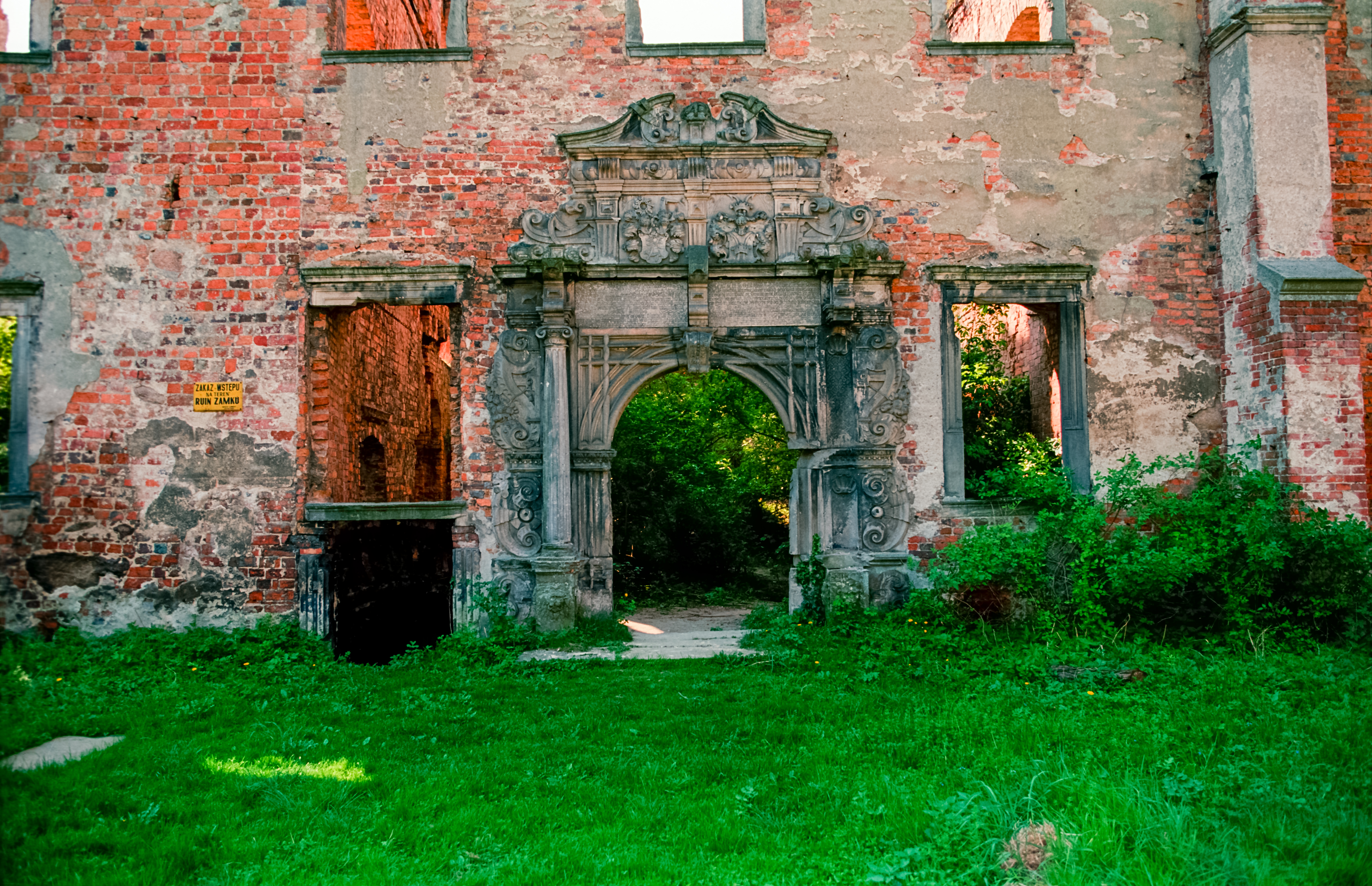 Siedlisko